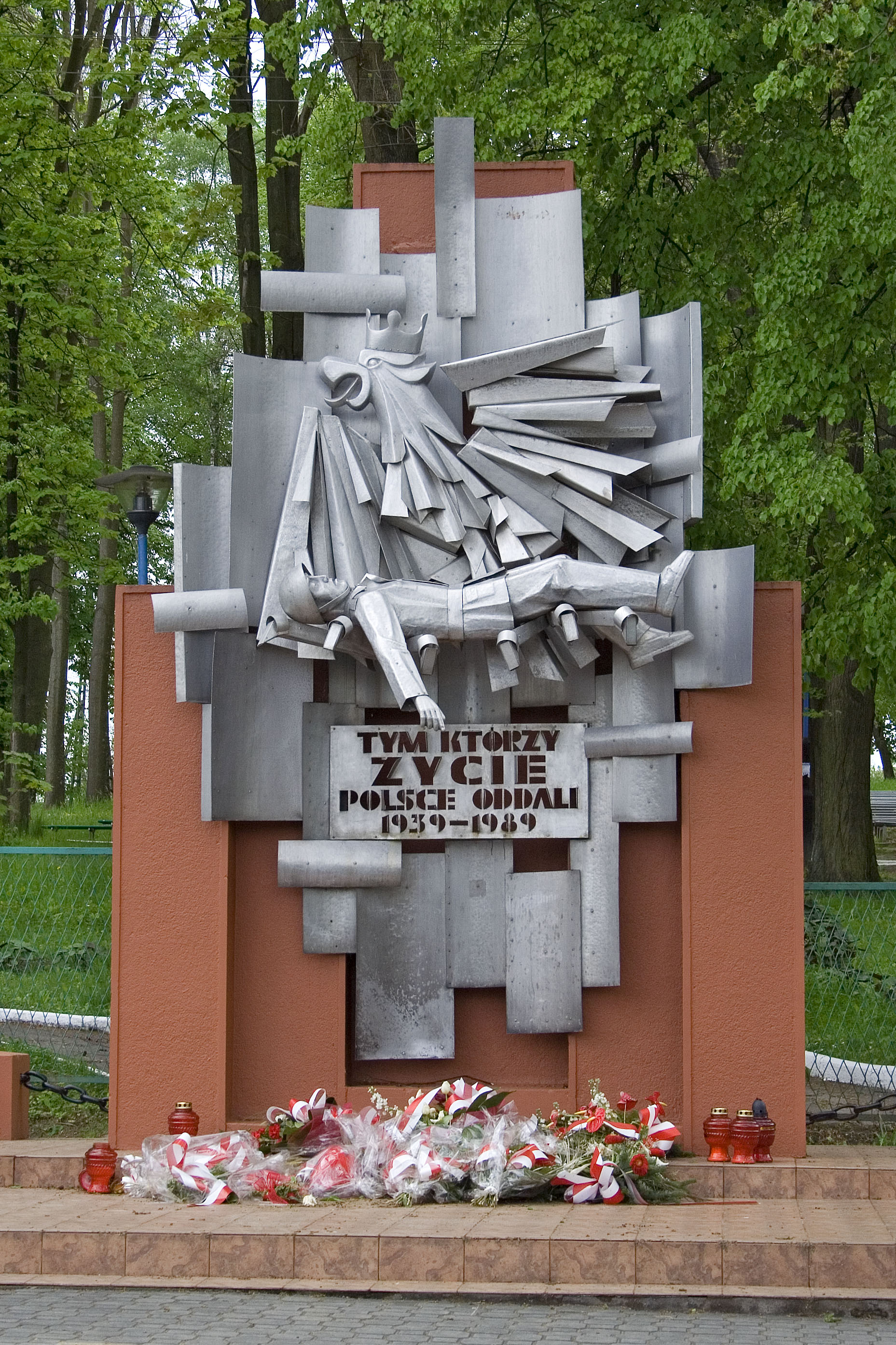 Pomnik Pamięci Narodu, tym którzy życie Polsce oddali, znajdujący się przy bramie wejściowej do parku jordanowskiego w Brzozowie.